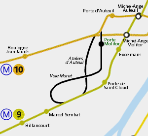 Extract from Image:Paris Metro map.gif, idea from Image:Haxo (Paris Metro).png by User:Superbfc. en: Locations of Porte Molitor Paris metro ghost station, La Voie Murat and the Auteuil maintenance facility. fr: Localisation de la station fantôme du métro de Paris Porte Molitor, de la Voie Murat et des Ateliers d'Auteuil.